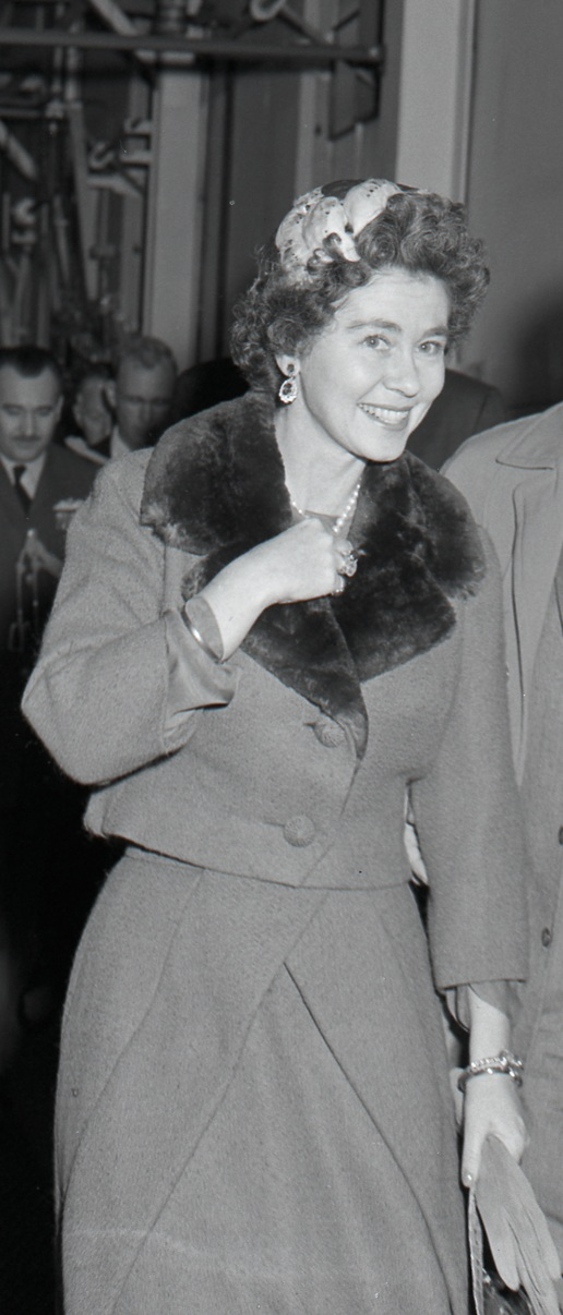 Queen Frederika of Greece